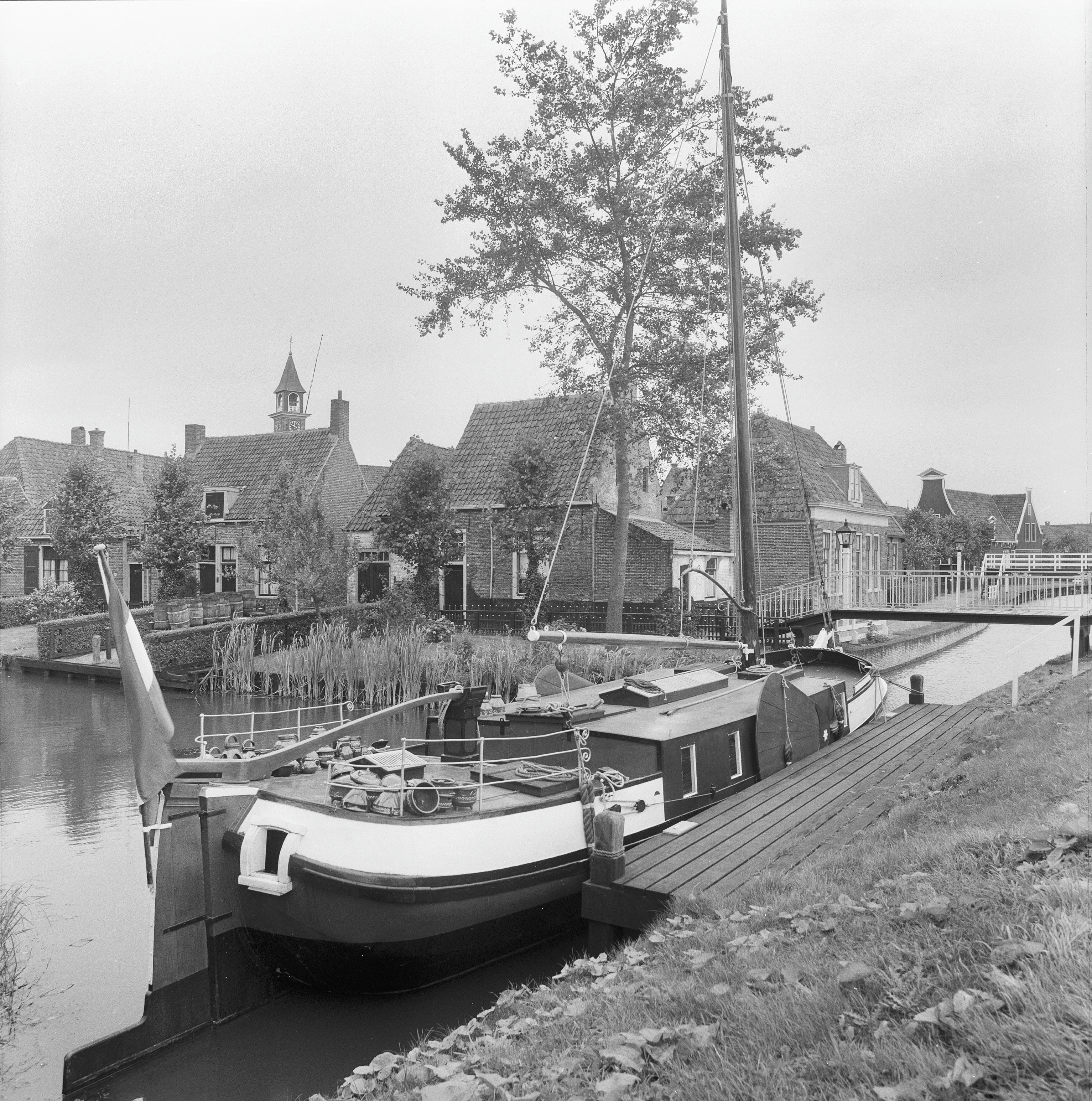 ZUIDERZEE MUSEUM, BUITENMUSEUM: Exterieur OVERZICHT